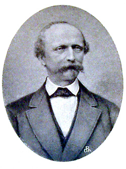 Jacob Brønnum Scavenius Estrup, Danish politician